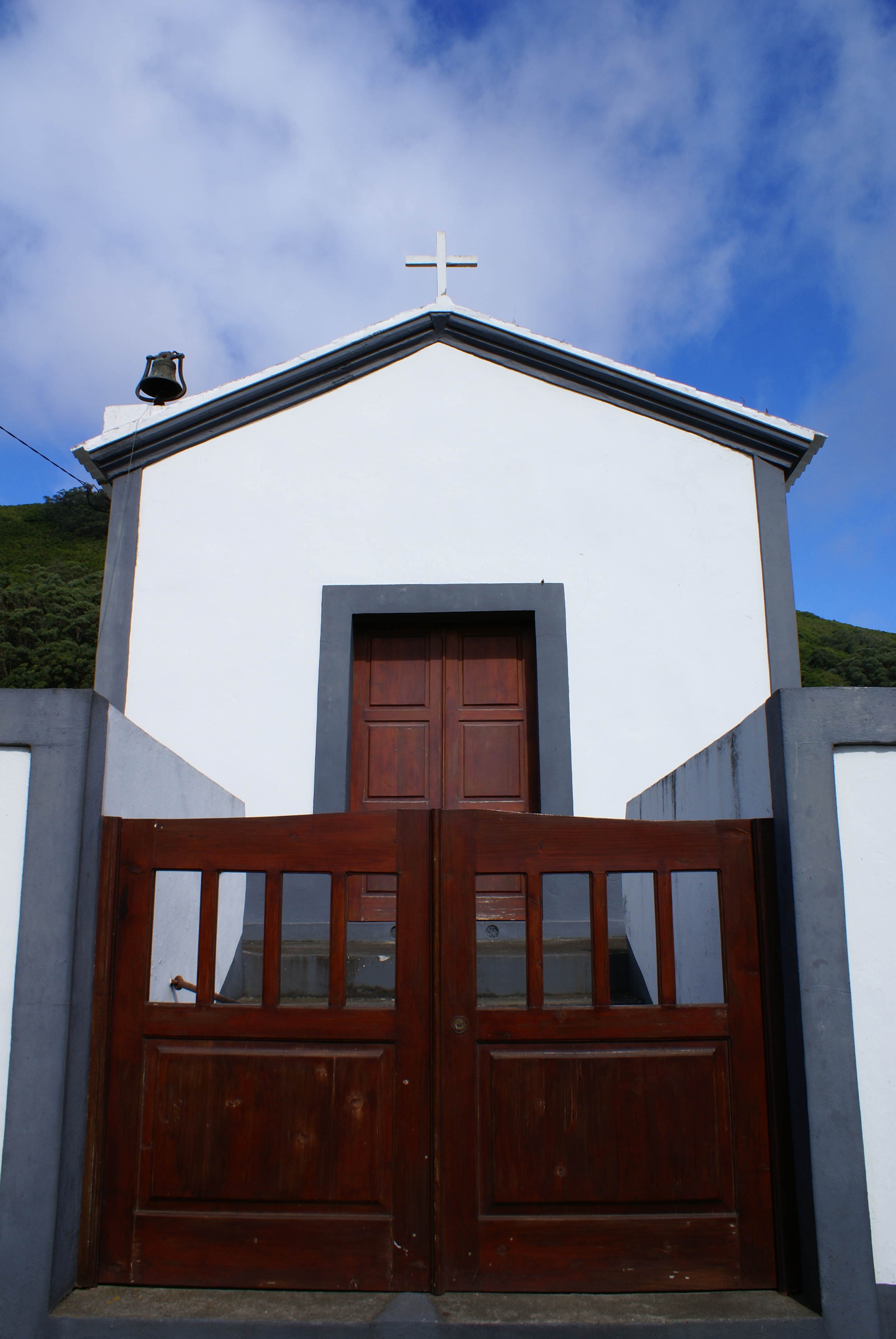 Ermida de Santa Ana da Lagoa, ilha Graciosa, Açores, Portugal